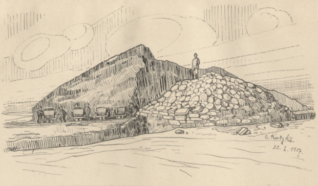 Fürstengrab von Helmsdorf